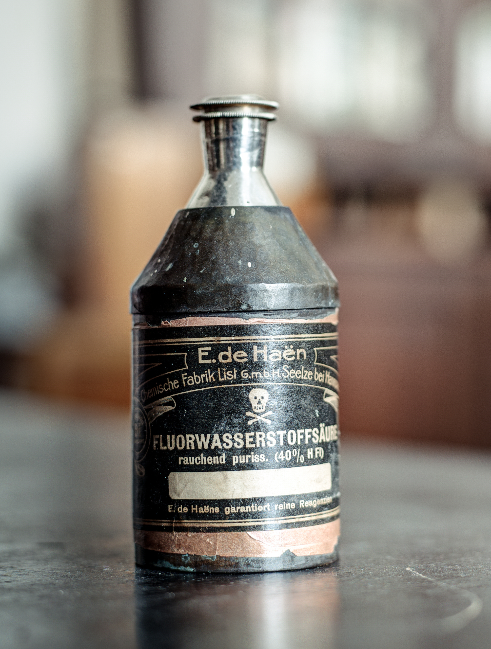 Konzentrierte Flußsäure in Stahlflasche der Fa. Eugen de Haen